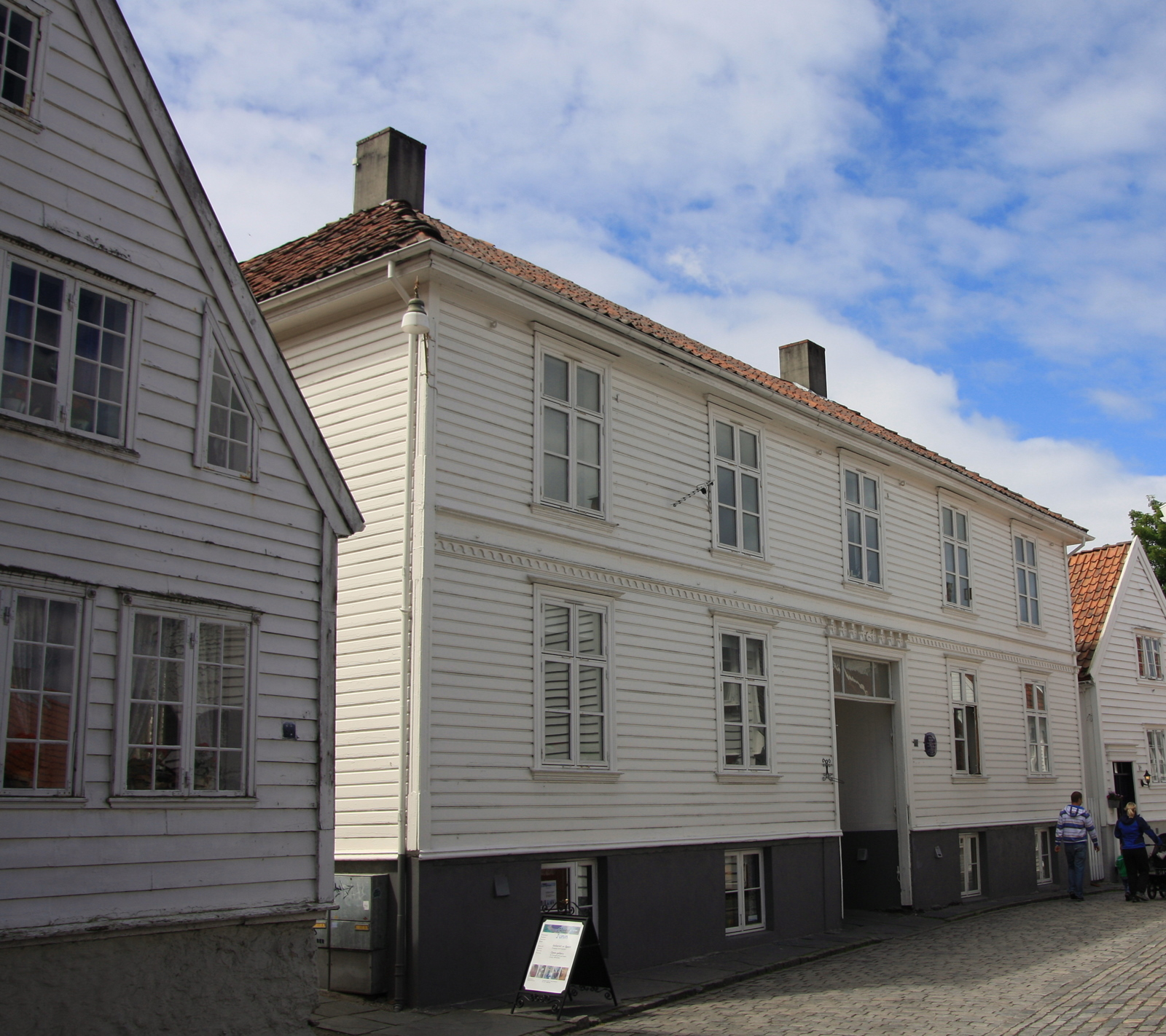 Sjømannshjemmet i Stavanger